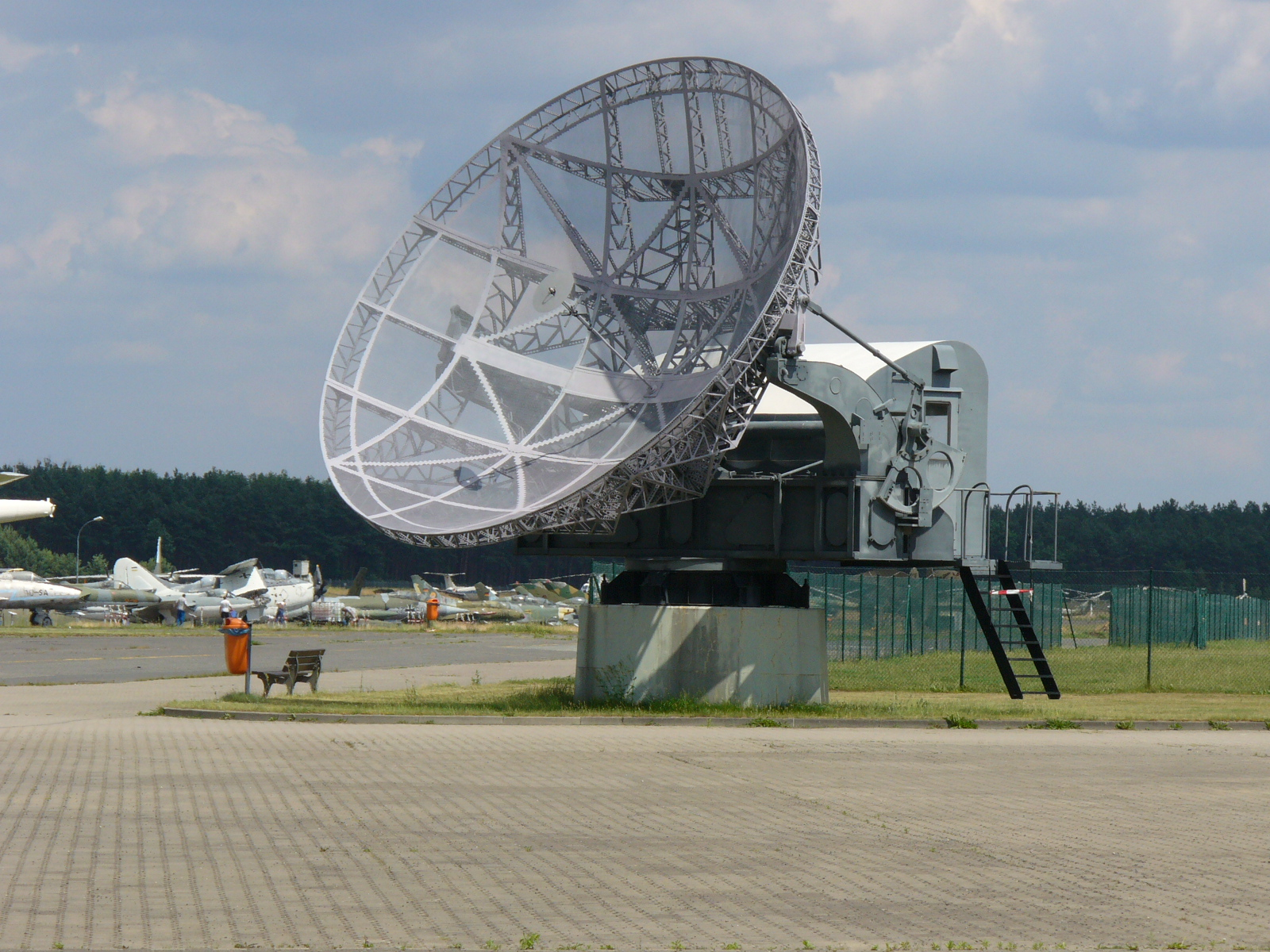 Radar Telefunken FuMG 65 Würzburg-Riese Telefunken FuMG 65 Würzburg-Riese radar